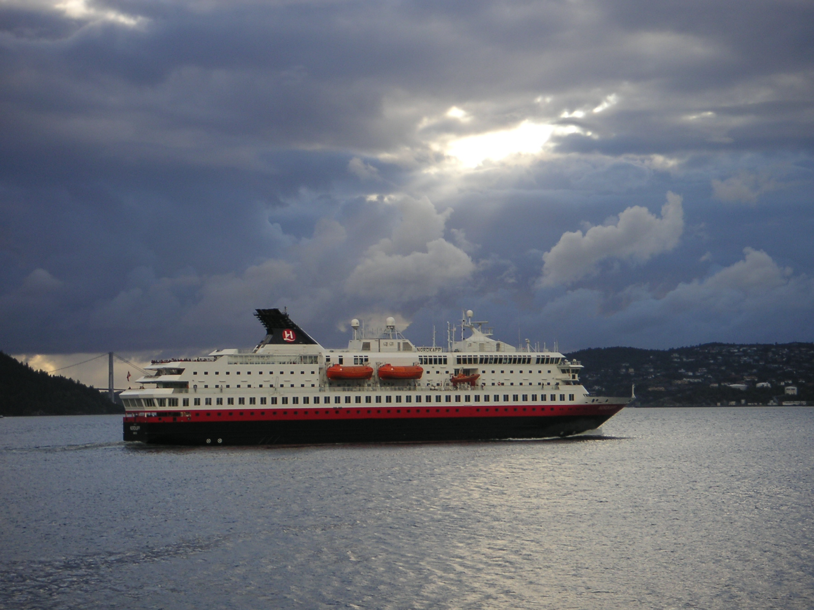 Hurtigrutenschiff MS Nordkapp auslaufend Bergen